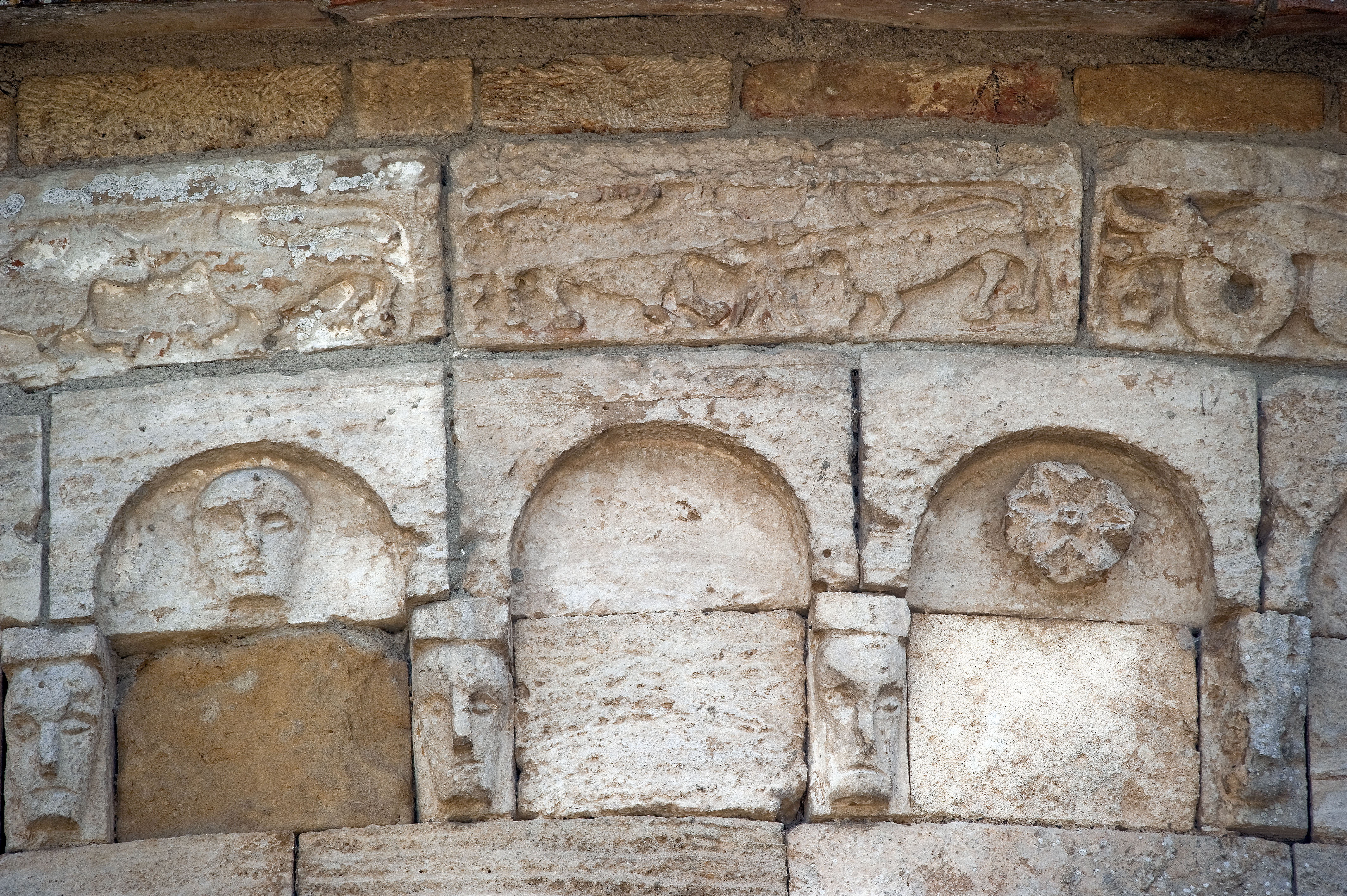 Decorazioni del tiburio dell' Abbazia di santa Maria Assunta a Conèo, Colle Val d'Elsa